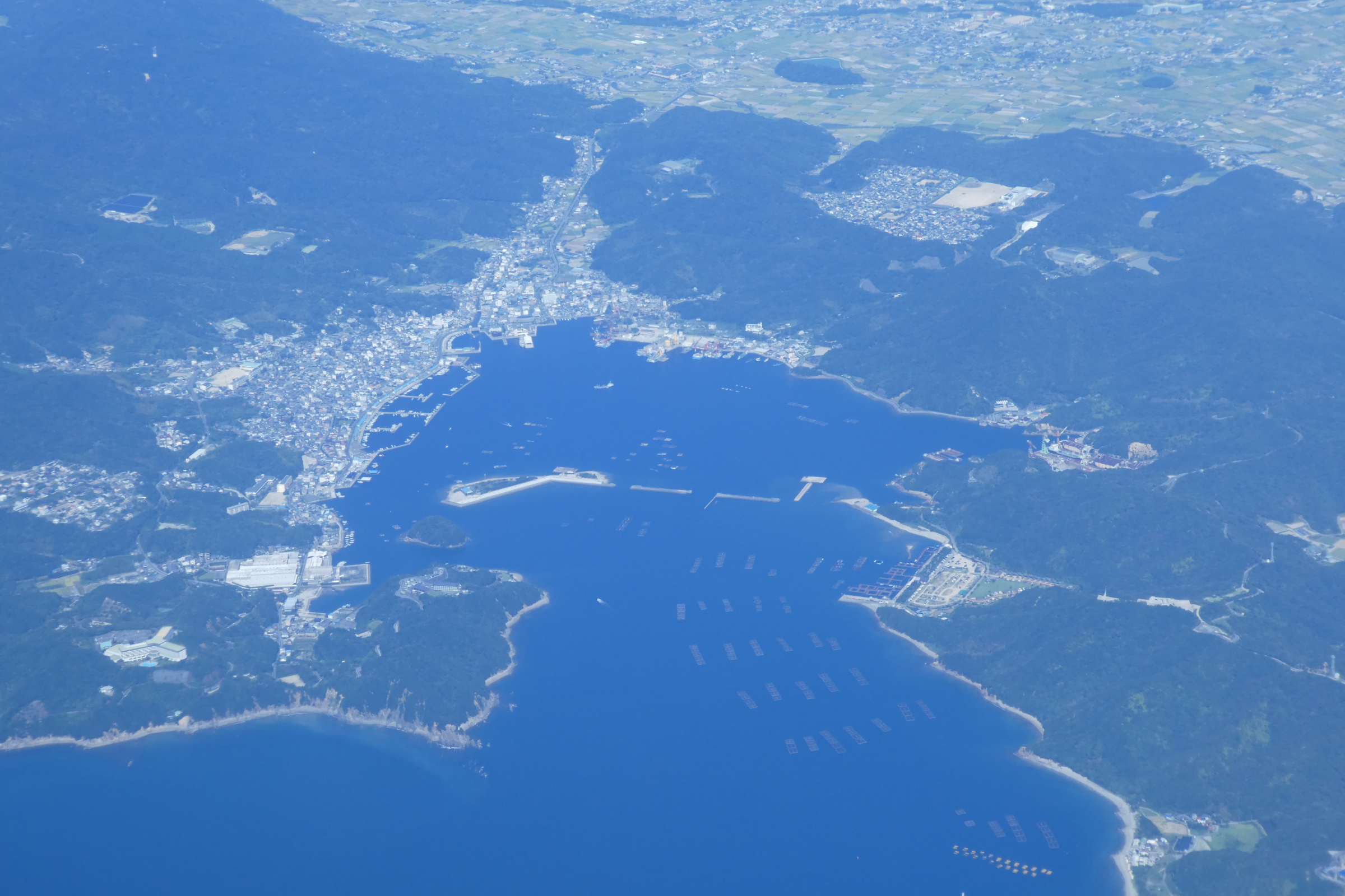 兵庫県淡路島南あわじ市福良湾